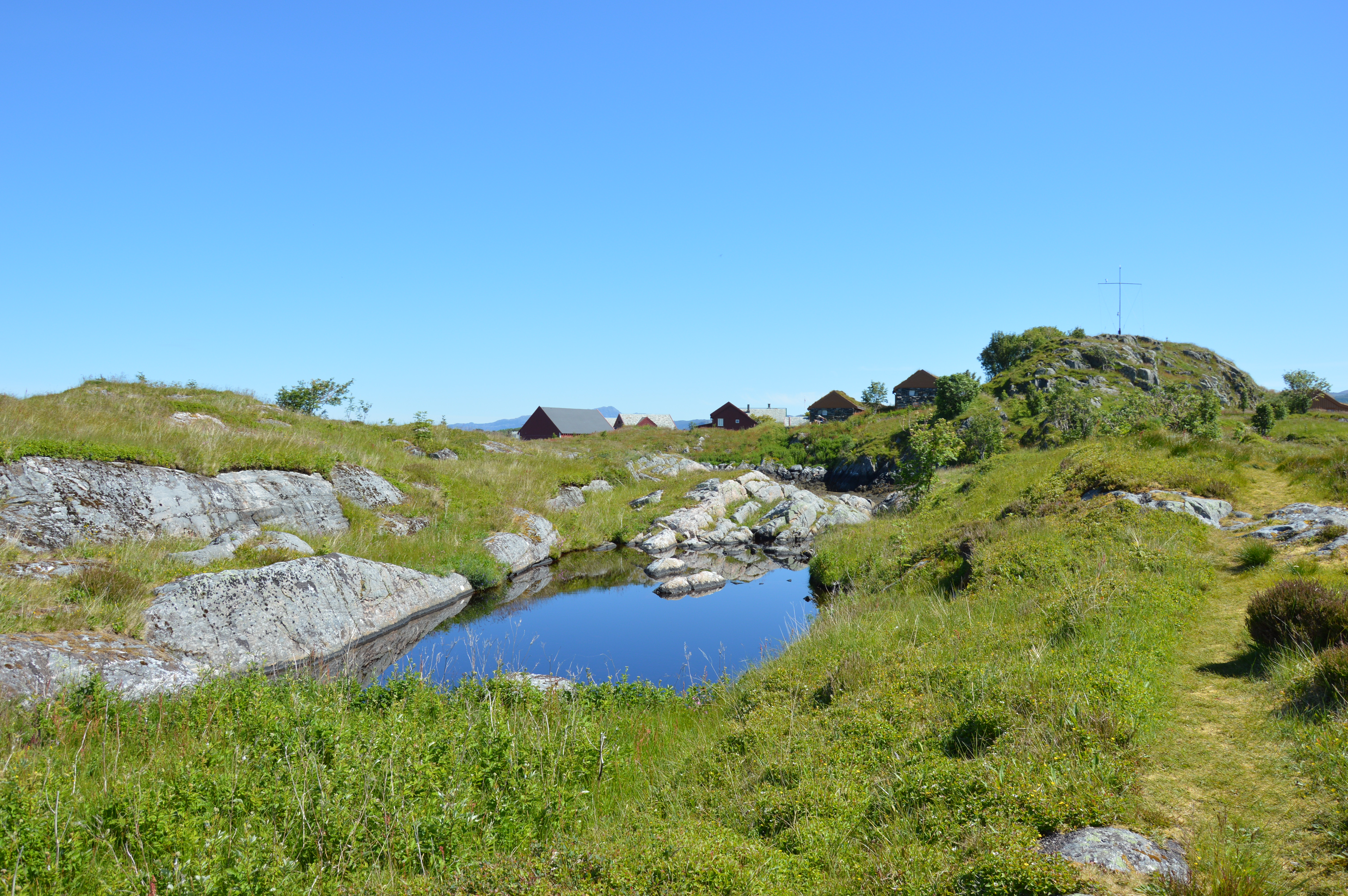 Håholmen